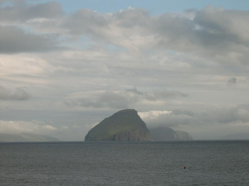 Blick auf Koltur von der Insel Vágar